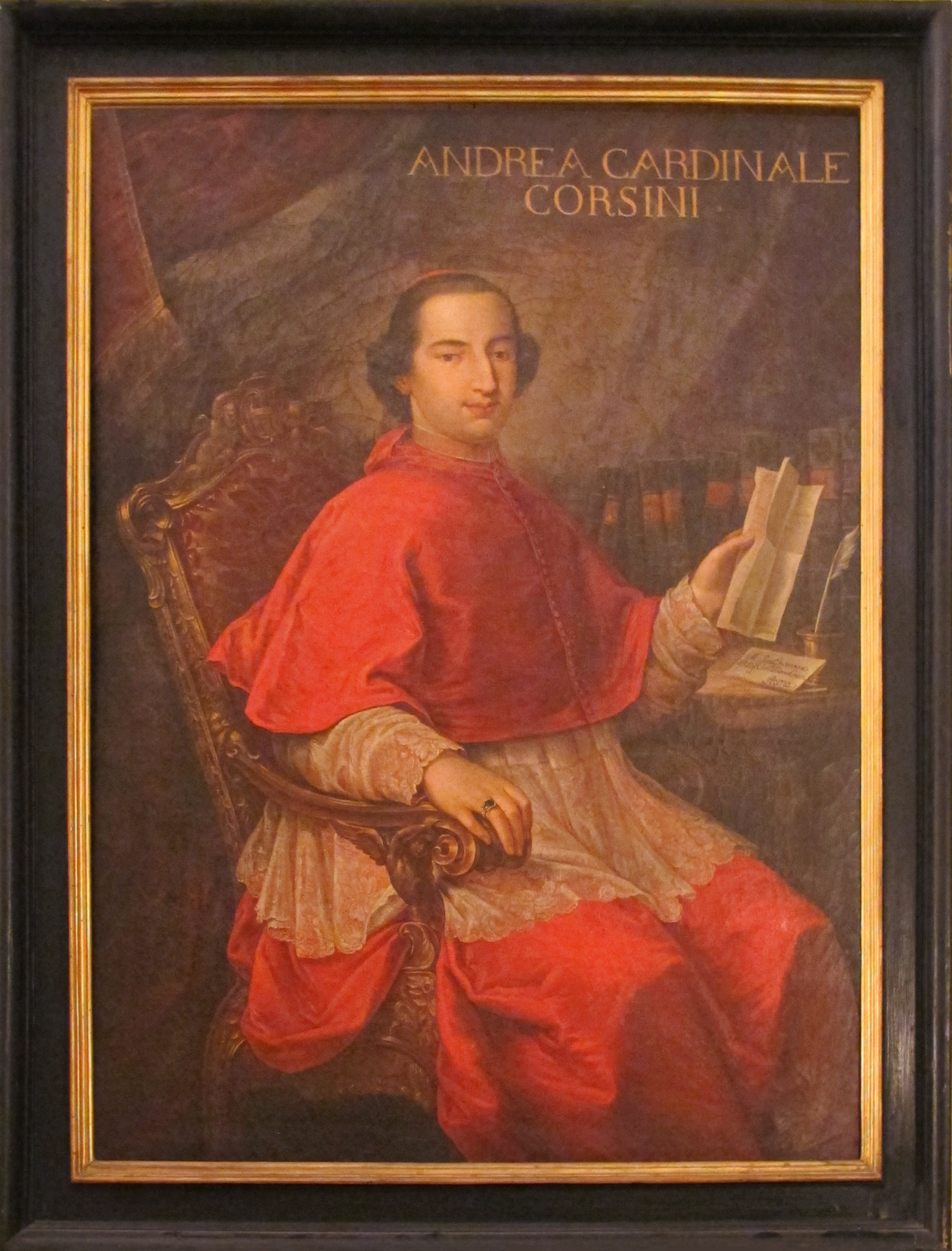 Ritratto di Andrea Corsini (1735-1795)